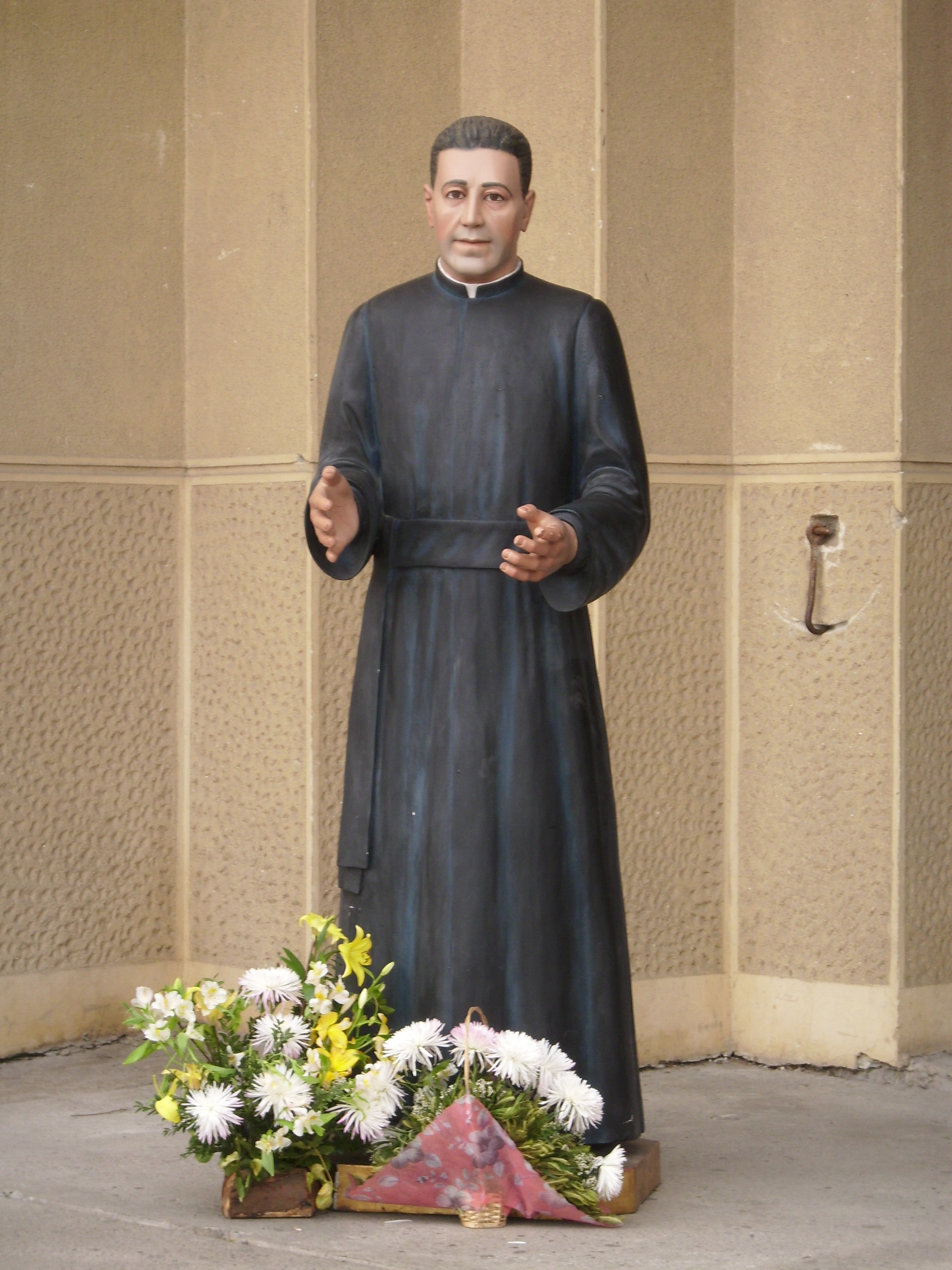 Estatua de San Alberto Hurtado en el Templo Votivo de Maipú. Santiago de Chile, 4 de septiembre de 2012.